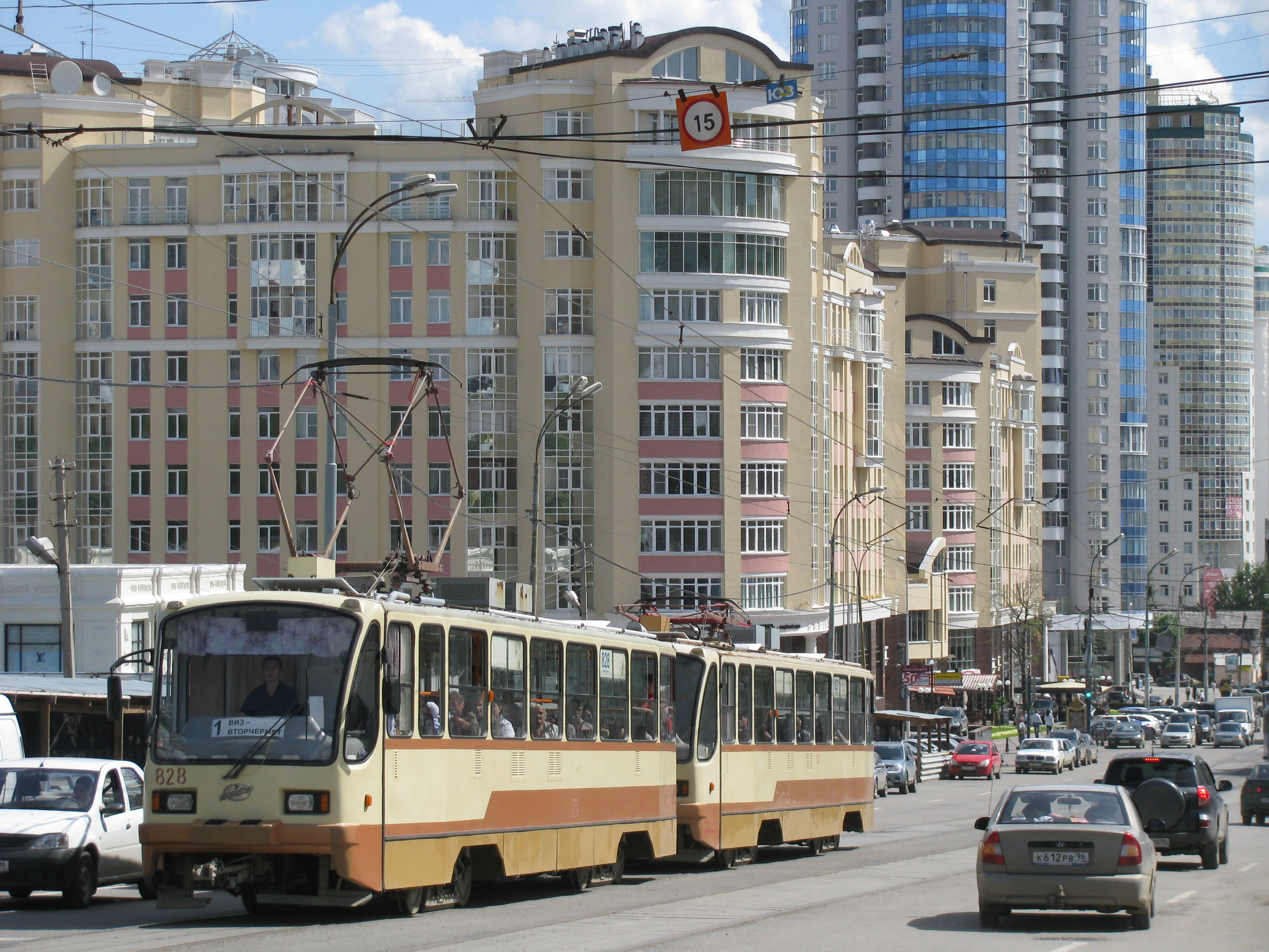 Tramvaj na rušné třídě v Jekaterinburgu, v pozadí nová zástavba, Rusko